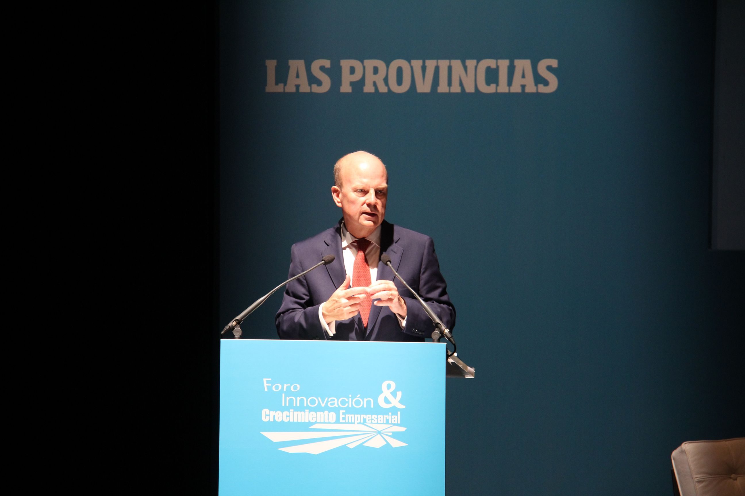 Máximo Buch, Conseller d'Economia de la Generalitat Valenciana a un acte en Torrent.